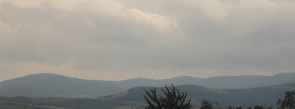 Pilat vu de Saint-Chamond